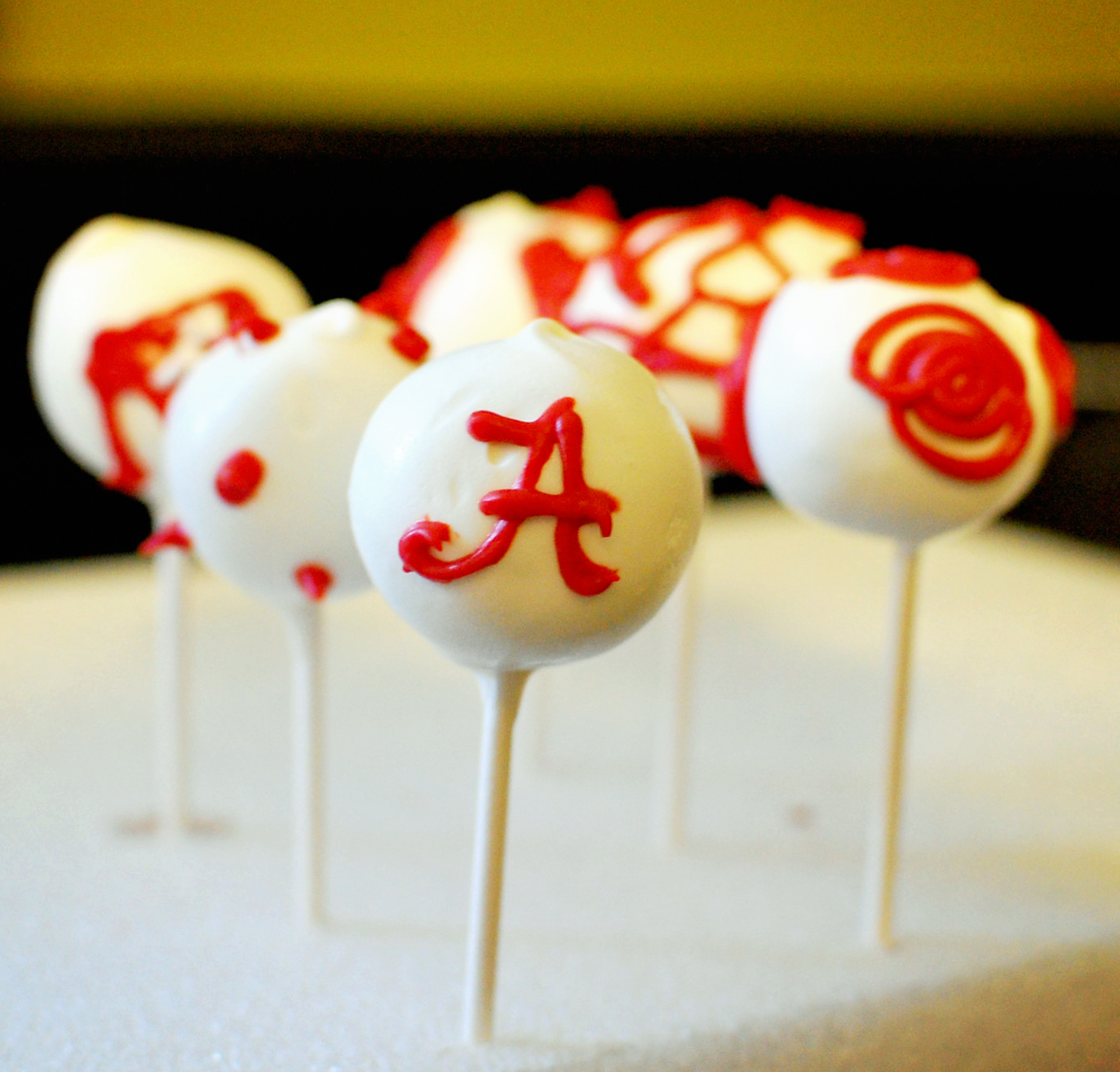 Alabama cake pops.